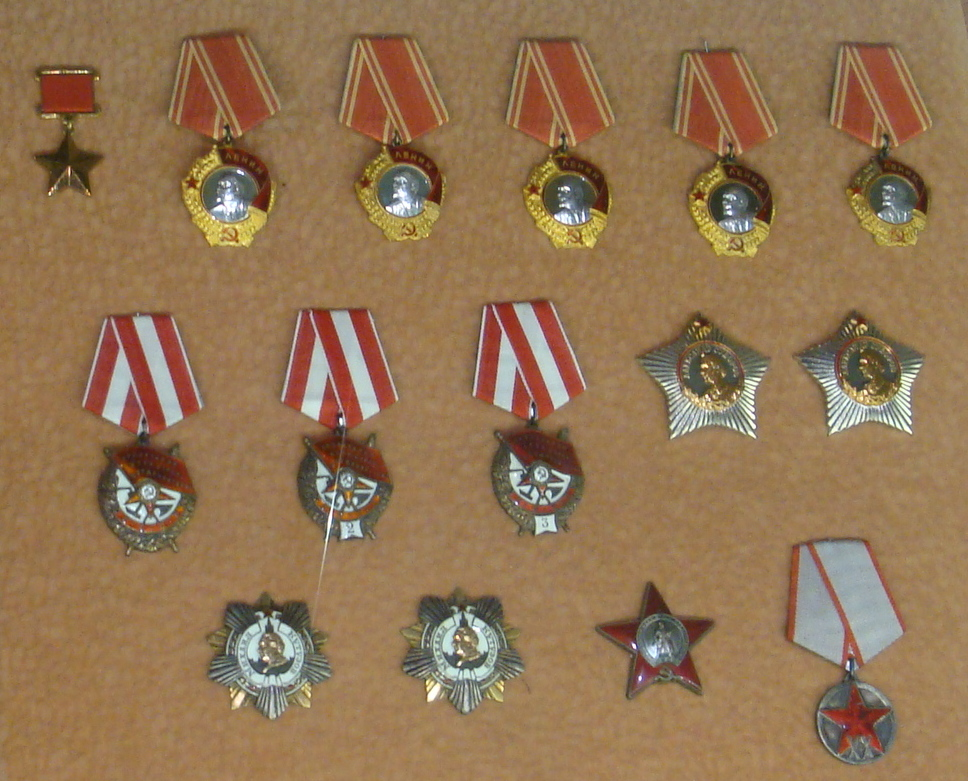 Награды Попова Маркиана Михайловича